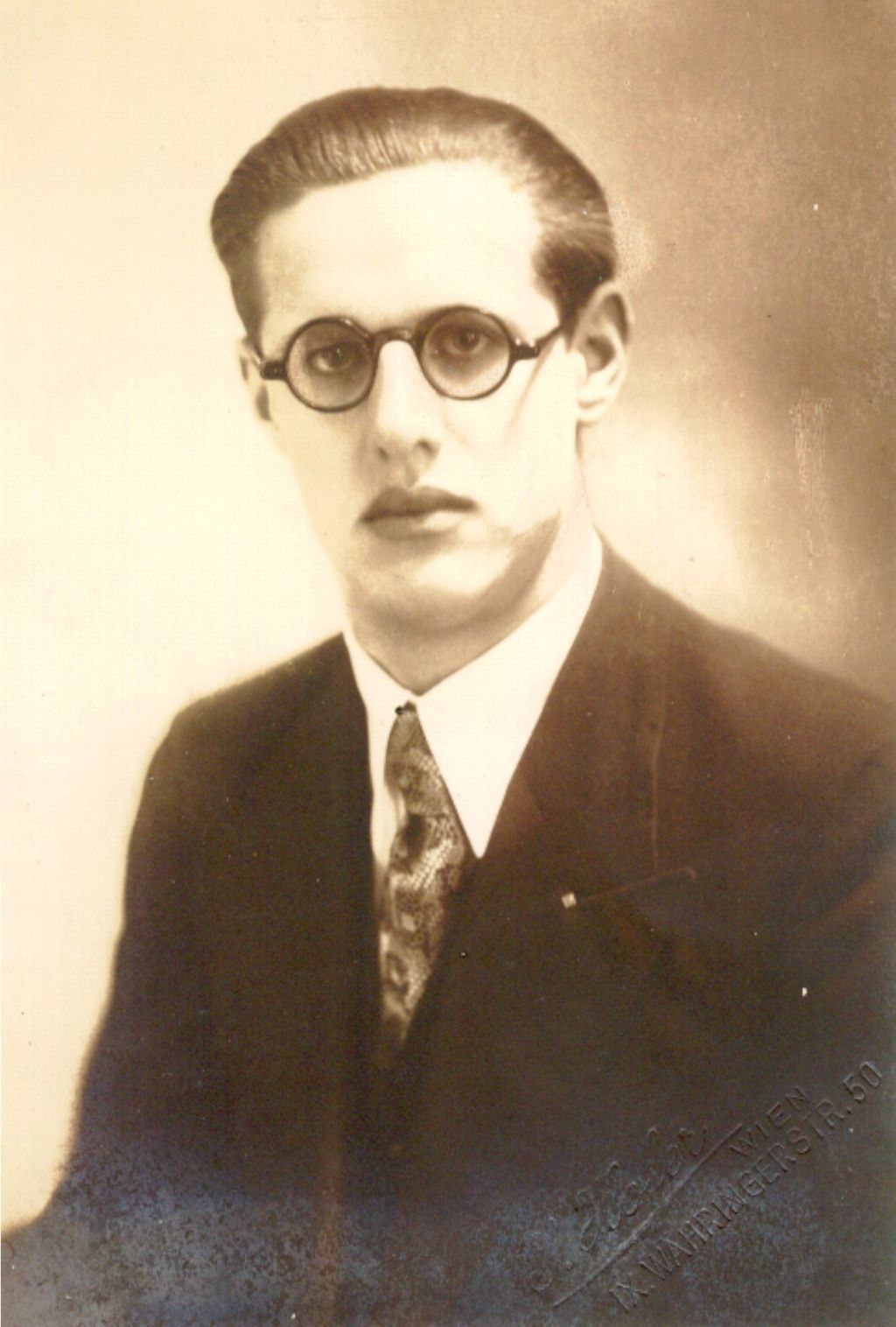 Fotografie Huberta Petschniga v době studii.